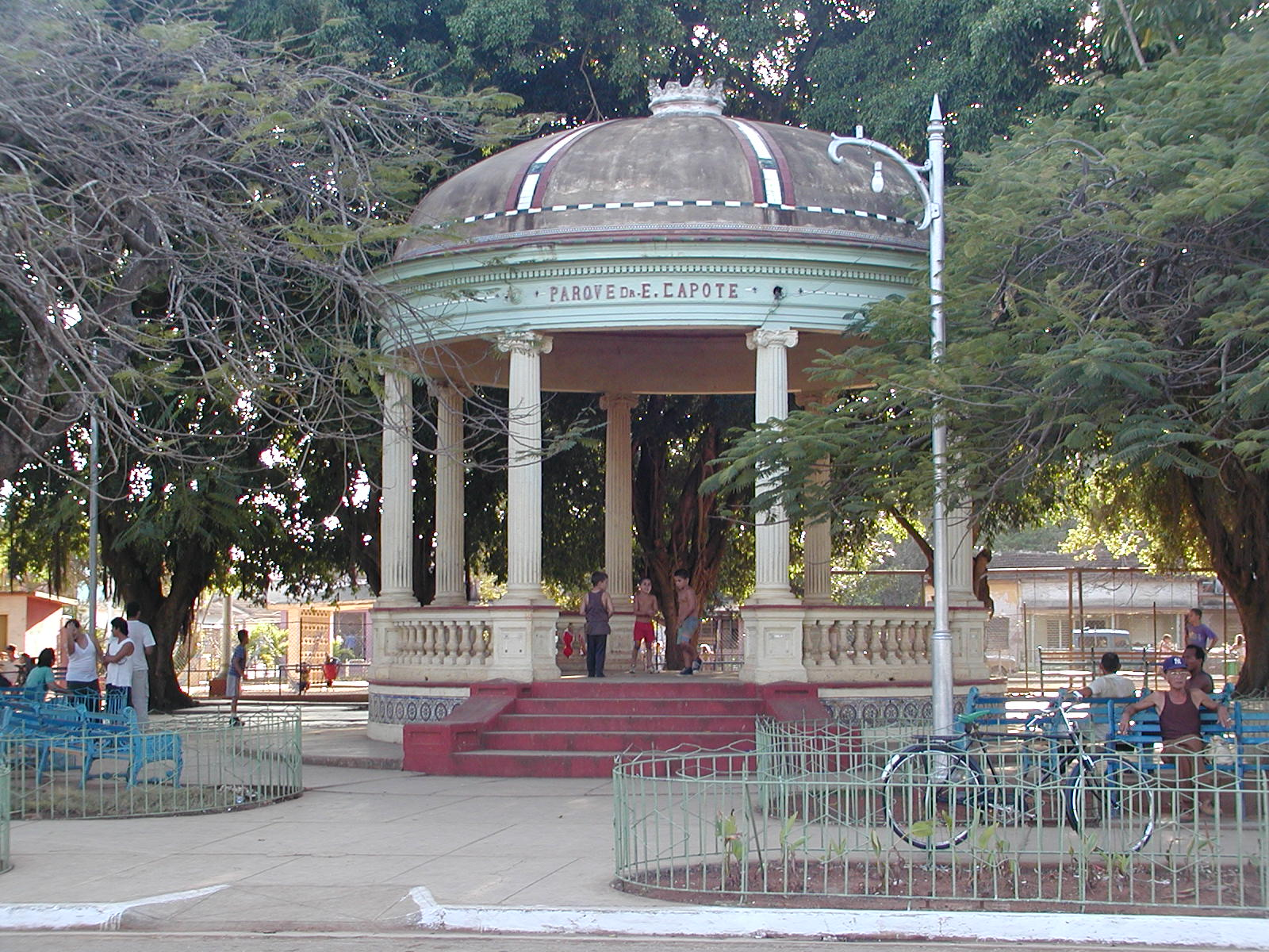 Glorieta de Quivicán. Está en el parque principal del pueblo.